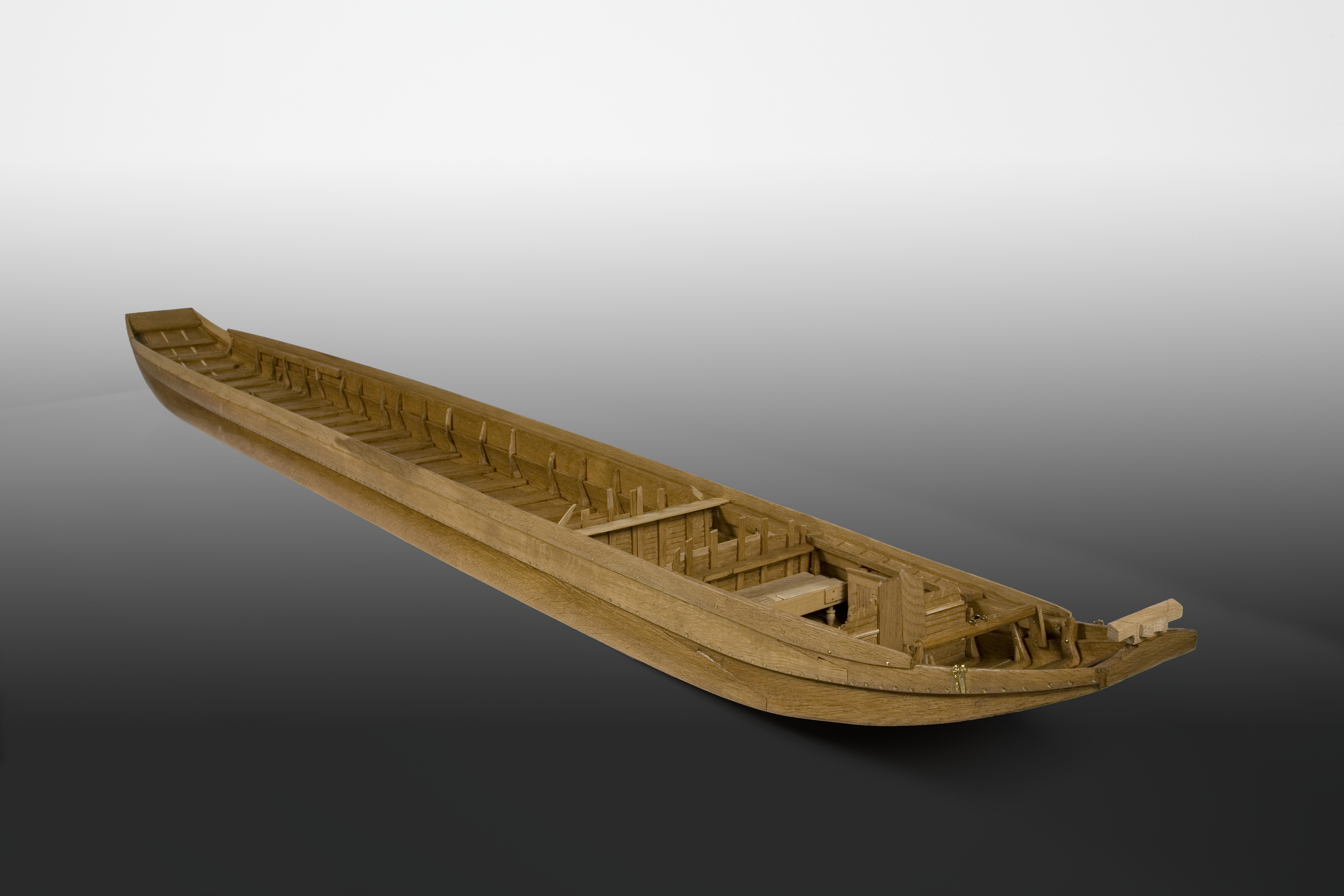 "model van "De Meern 1"" Objectnummer: DG2008_0404